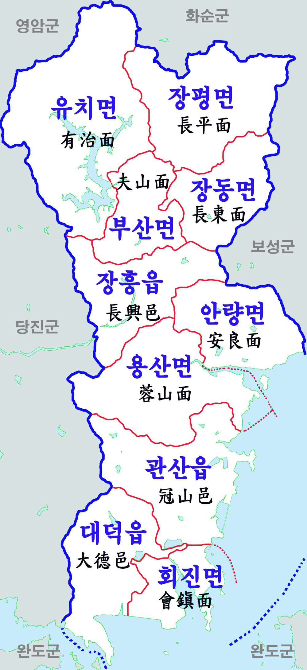 전남 장흥군 행정구역도